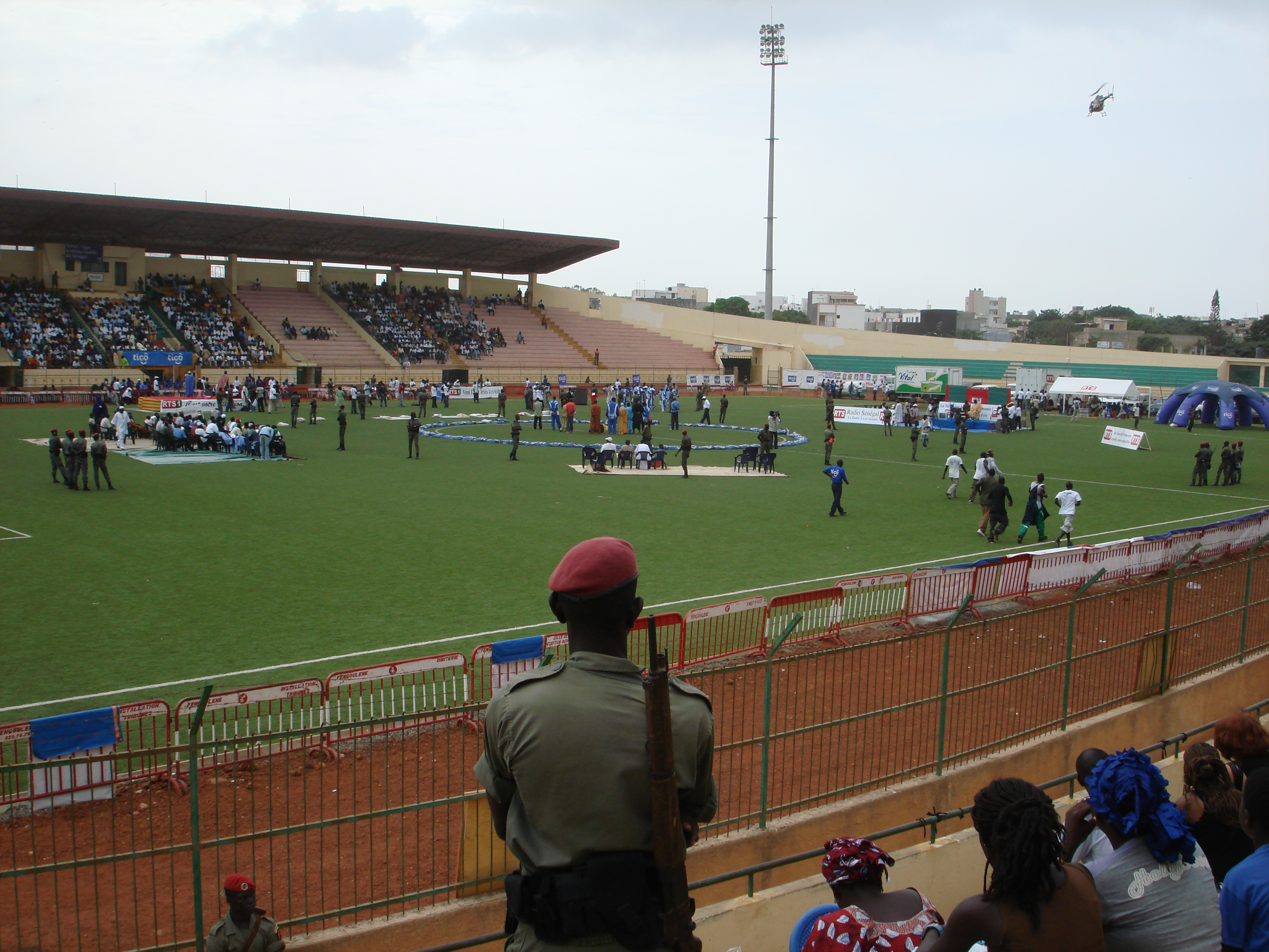 Lutte sénégalaise au stade Demba Diop de Dakar (Sénégal)